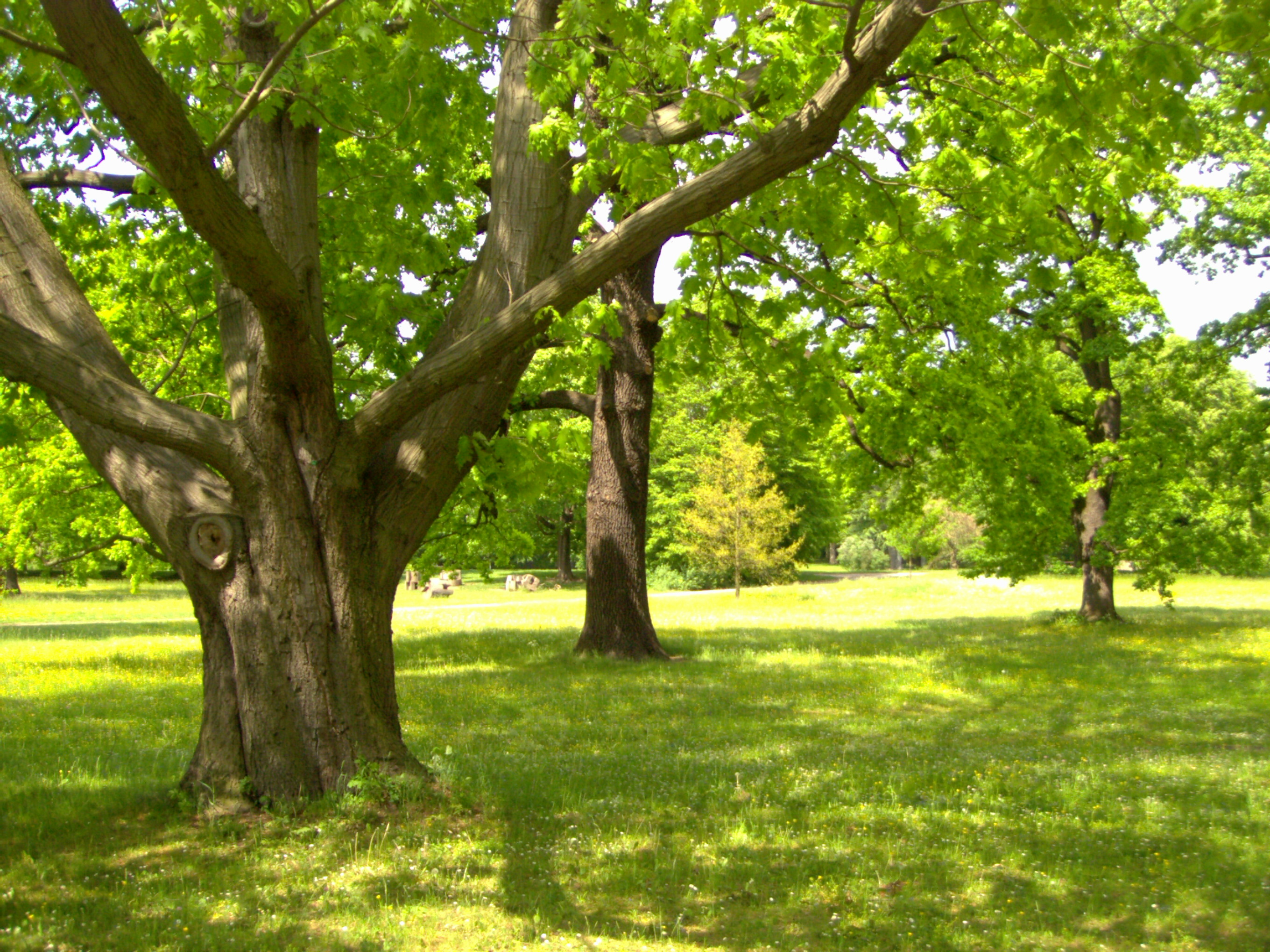 Alte Eichen im Englischen Garten von Schloss Friedenstein.